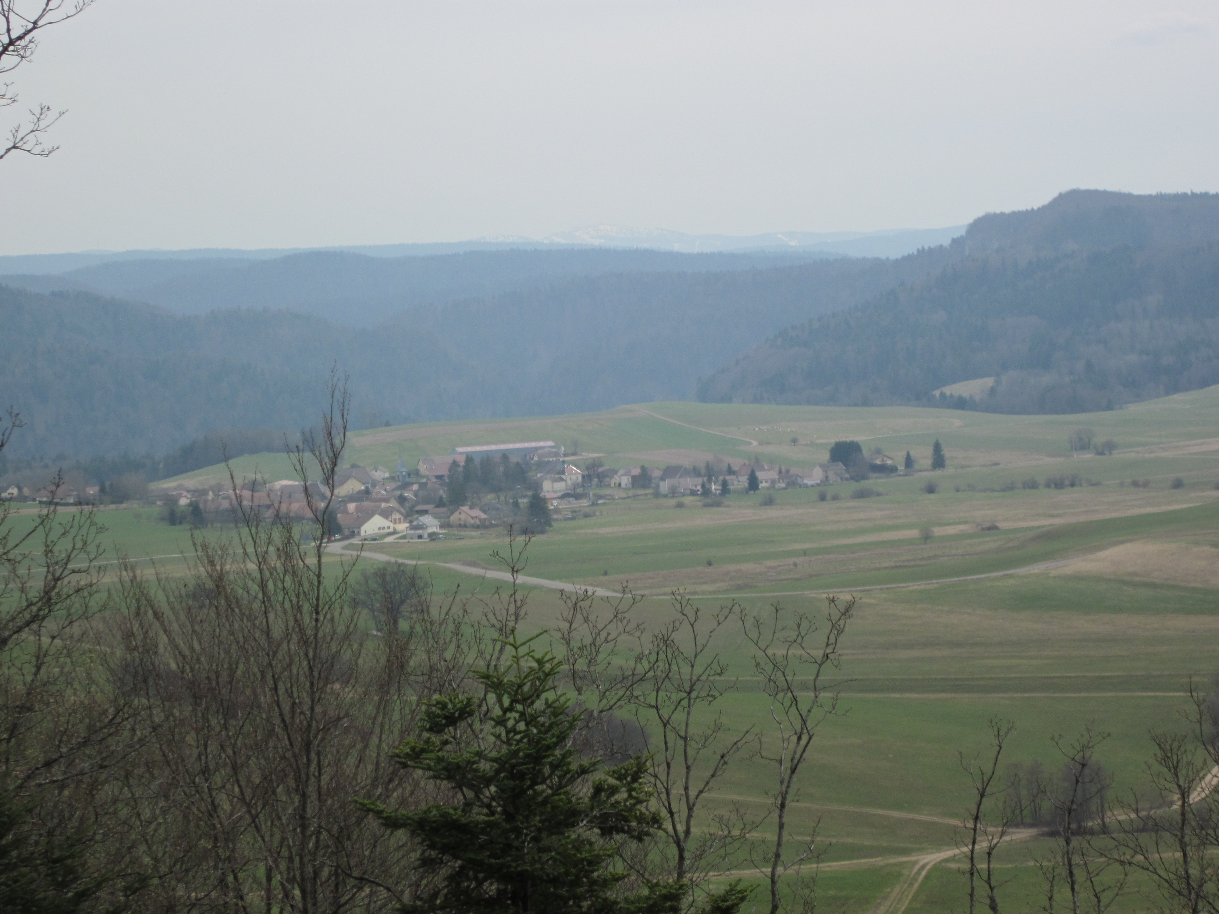 Village du Vaudioux dans le département du Jura